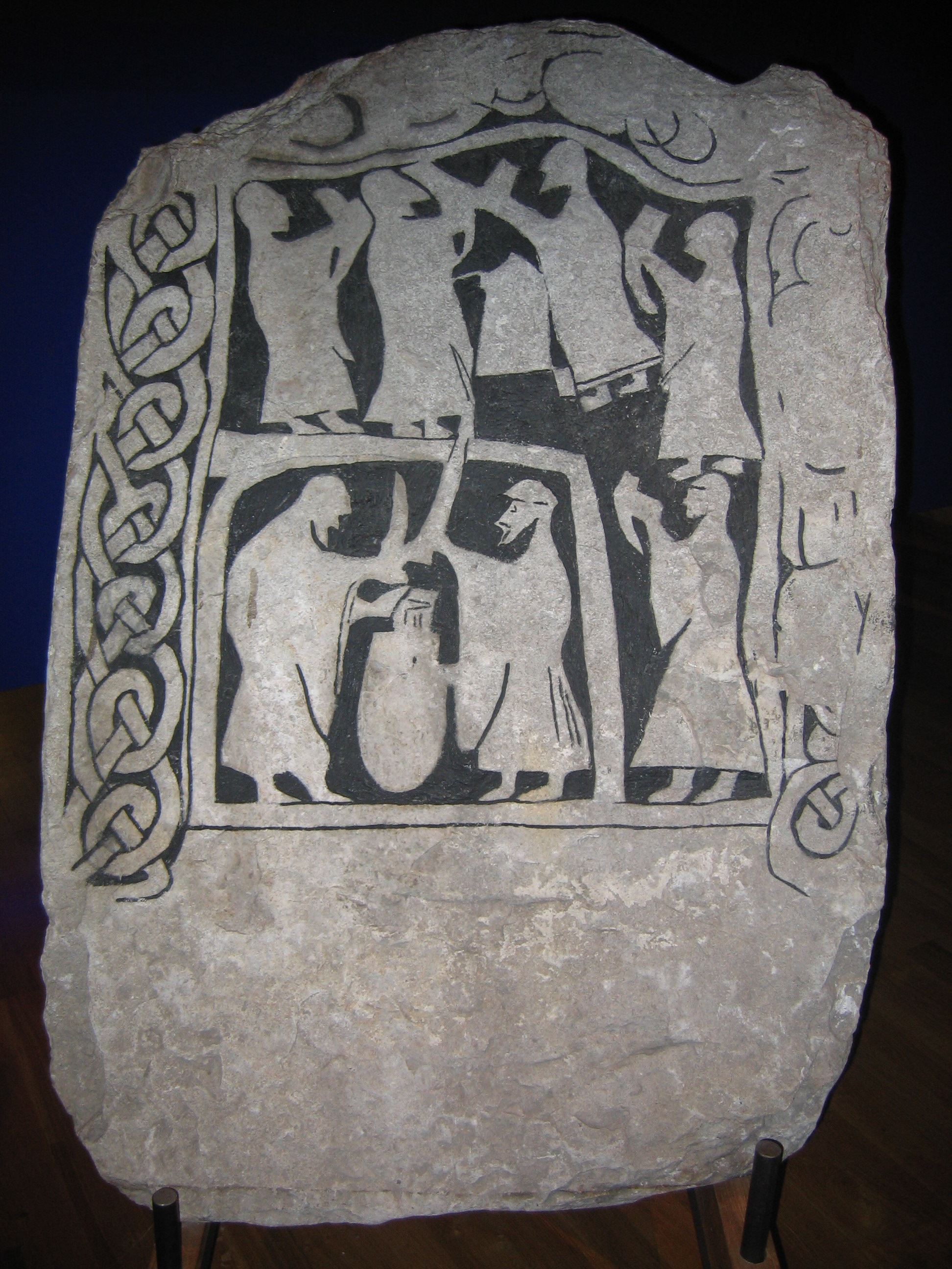 picture stone